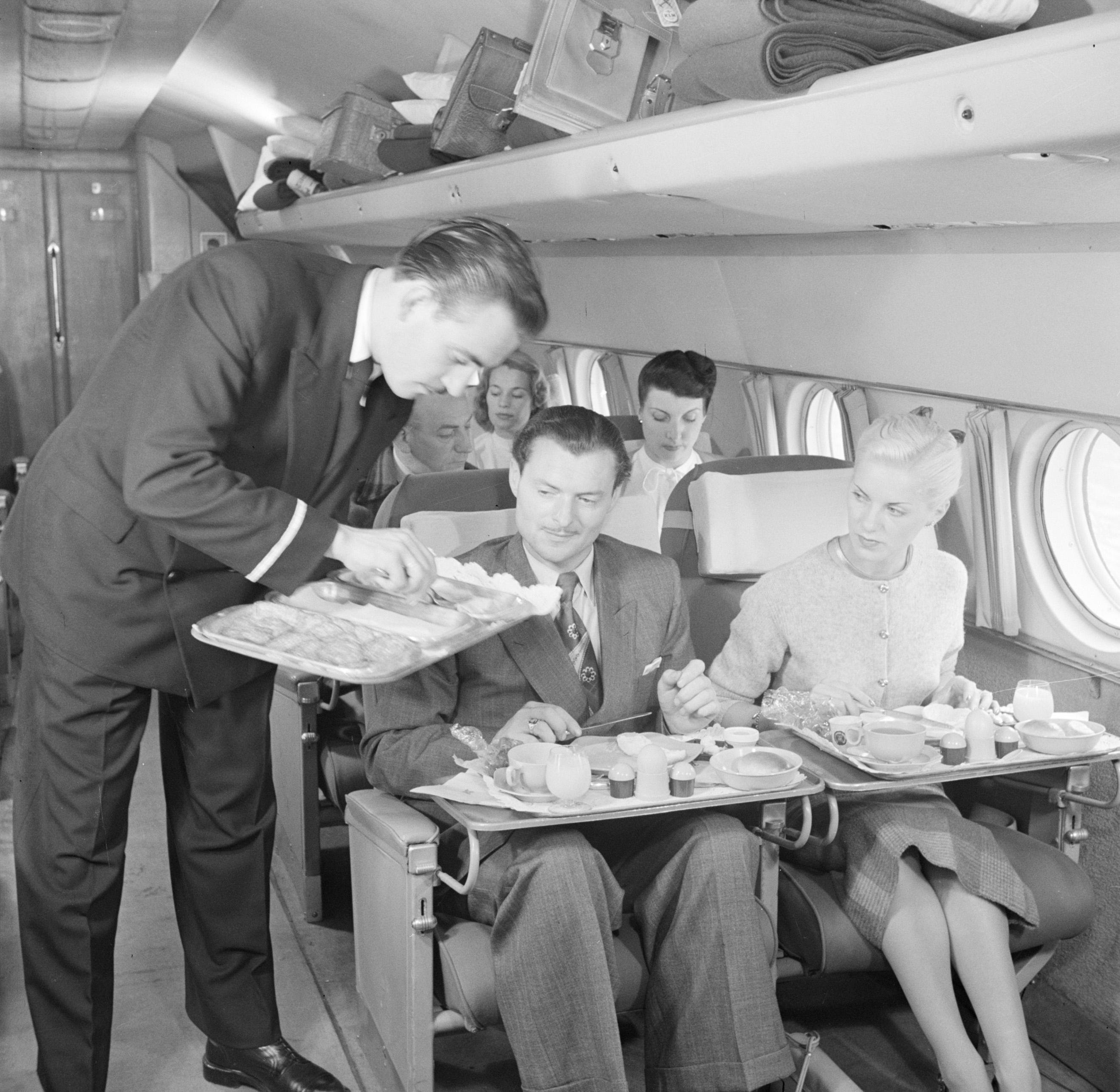 Collectie / Archief : Fotocollectie Van de Poll Reportage / Serie : Reclame KLM Beschrijving : Een KLM-purser serveert de maaltijd tijdens de vlucht in een KLM passagiersvliegtuig Datum : 1950 Trefwoorden : interieur, maaltijden, reizigers, vliegtuigen, vliegtuigpersoneel Instellingsnaam : KLM, Schiphol Fotograaf : Poll, Willem van de Auteursrechthebbende : Nationaal Archief Materiaalsoort : Negatief (zwart/wit) Nummer archiefinventaris : bekijk toegang 2.24.14.02 Bestanddeelnummer : 252-1244